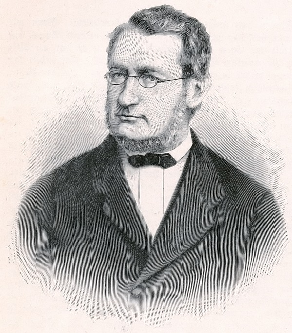 Julius Robert von Mayer (1814-1878)